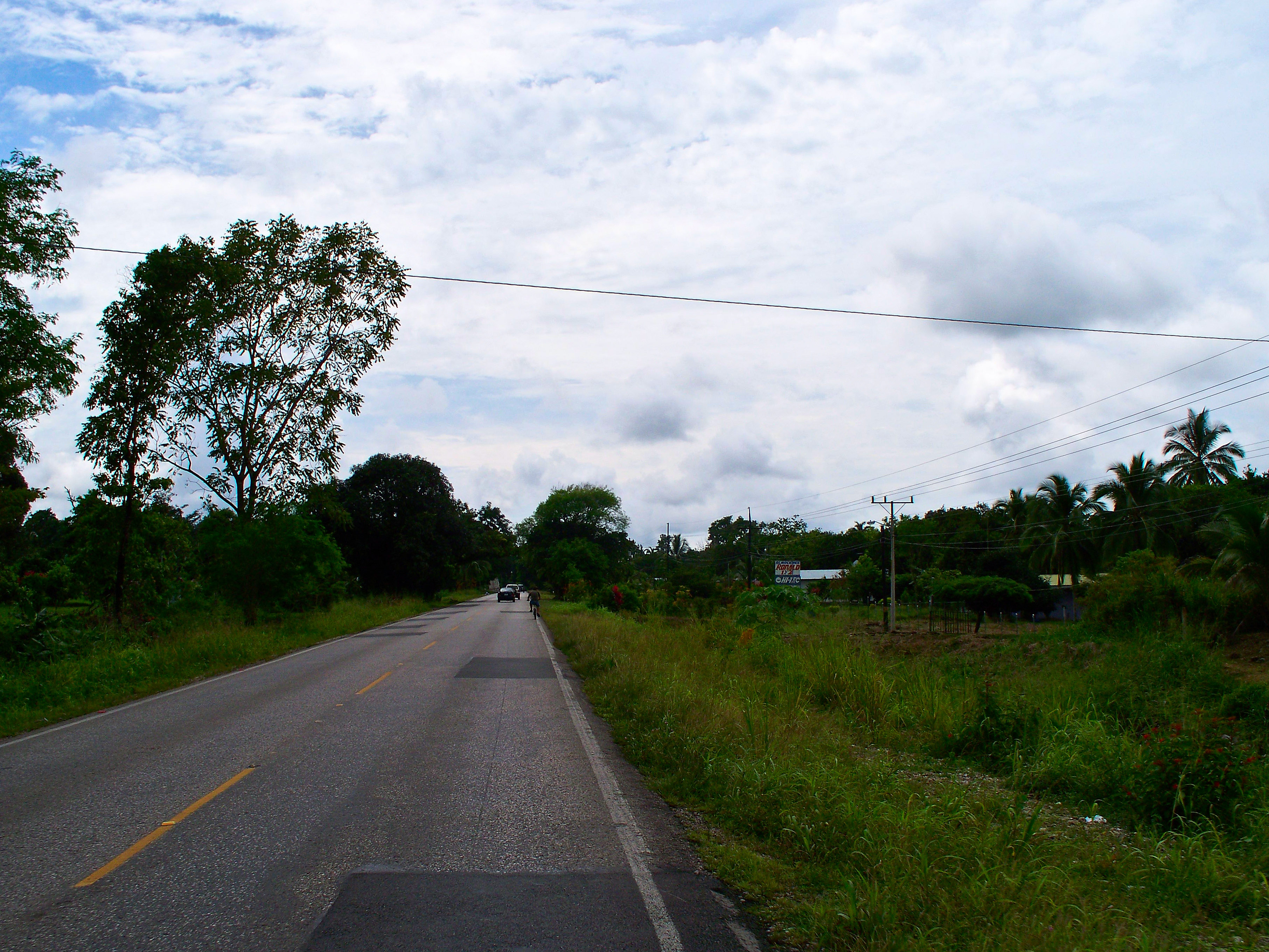 La carretera panamericana (CR #2) entre Neily y Paso Canoas cerca la frontera de Panamá.